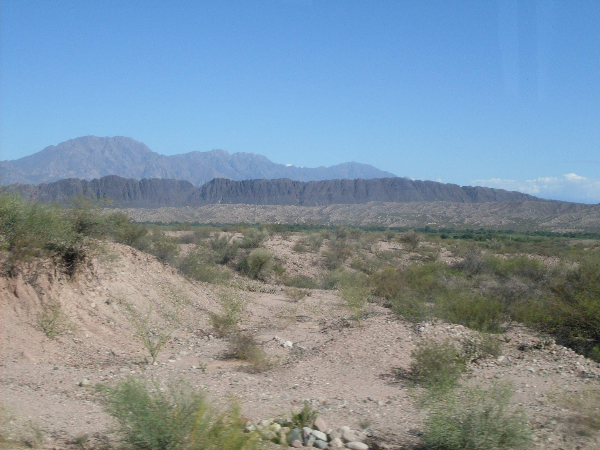 Cercanías a Cerro Negro, provincia de Catamarca.